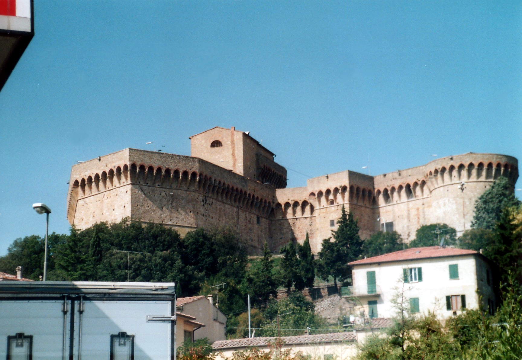 Author Giorces. Volterra il Castello.